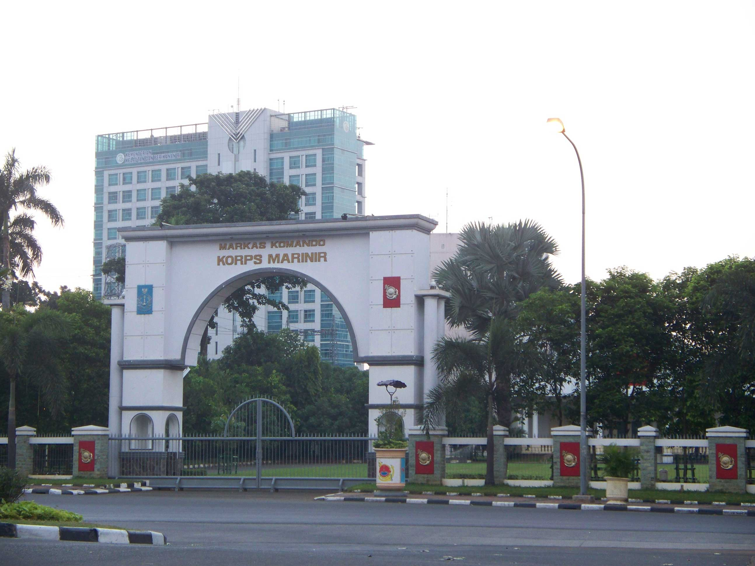 Markas Komando Korps Marinir